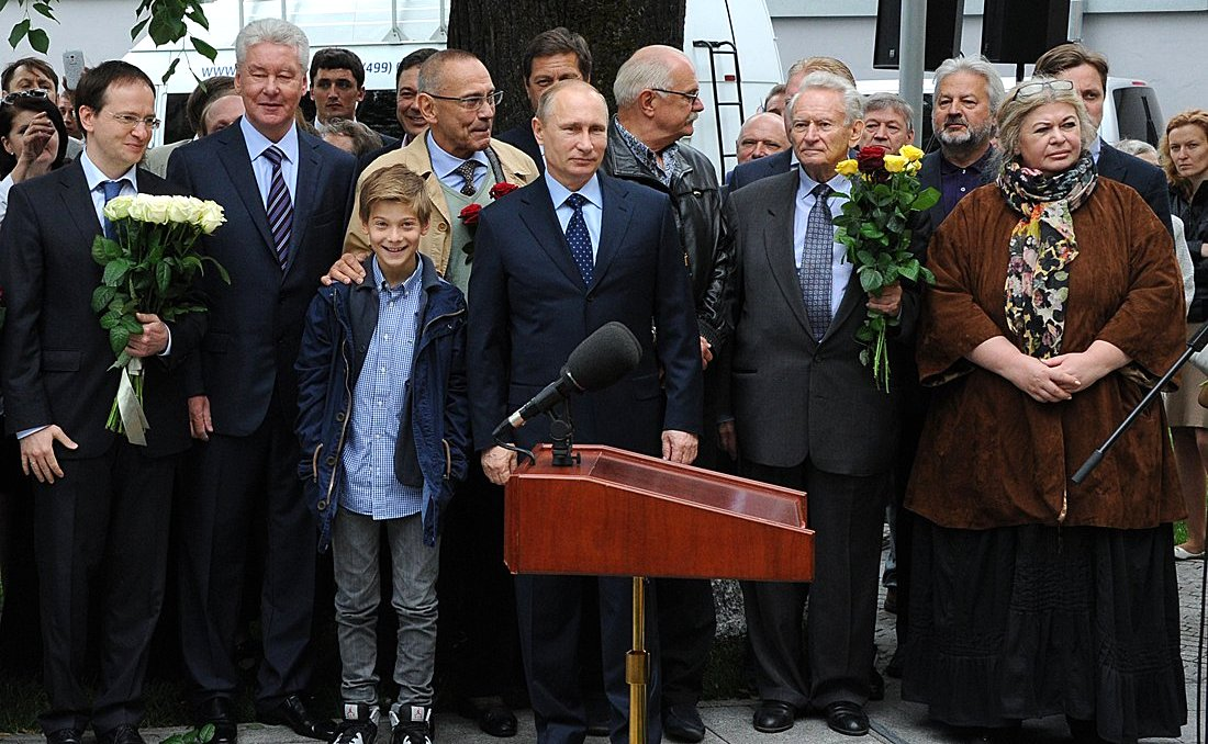 На церемонии открытия памятника Сергею Михалкову. Слева направо: Министр культуры Владимир Мединский; мэр Москвы Сергей Собянин; сценарист и режиссёр Андрей Кончаловский; актёр, режиссёр, сценарист и продюсер Никита Михалков; журналист-международник Генрих Боровик; вдова Сергея Михалкова Юлия Субботина.